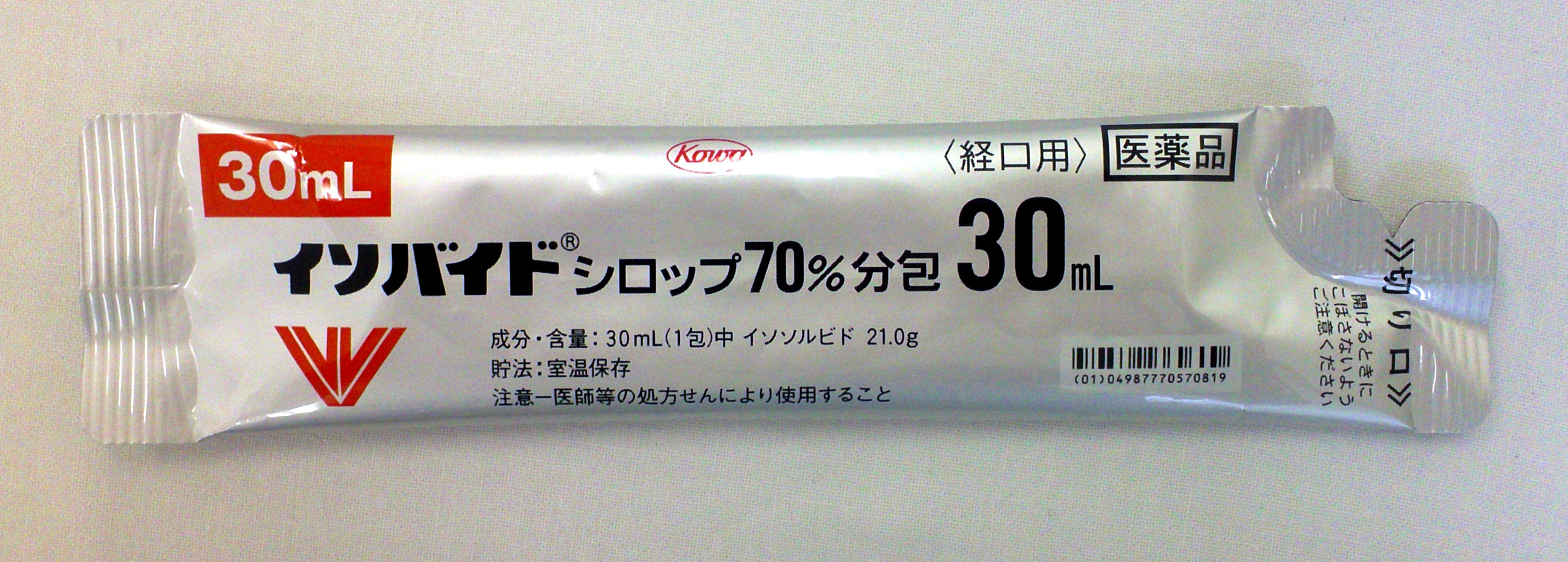 イソバイド・シロップ製剤